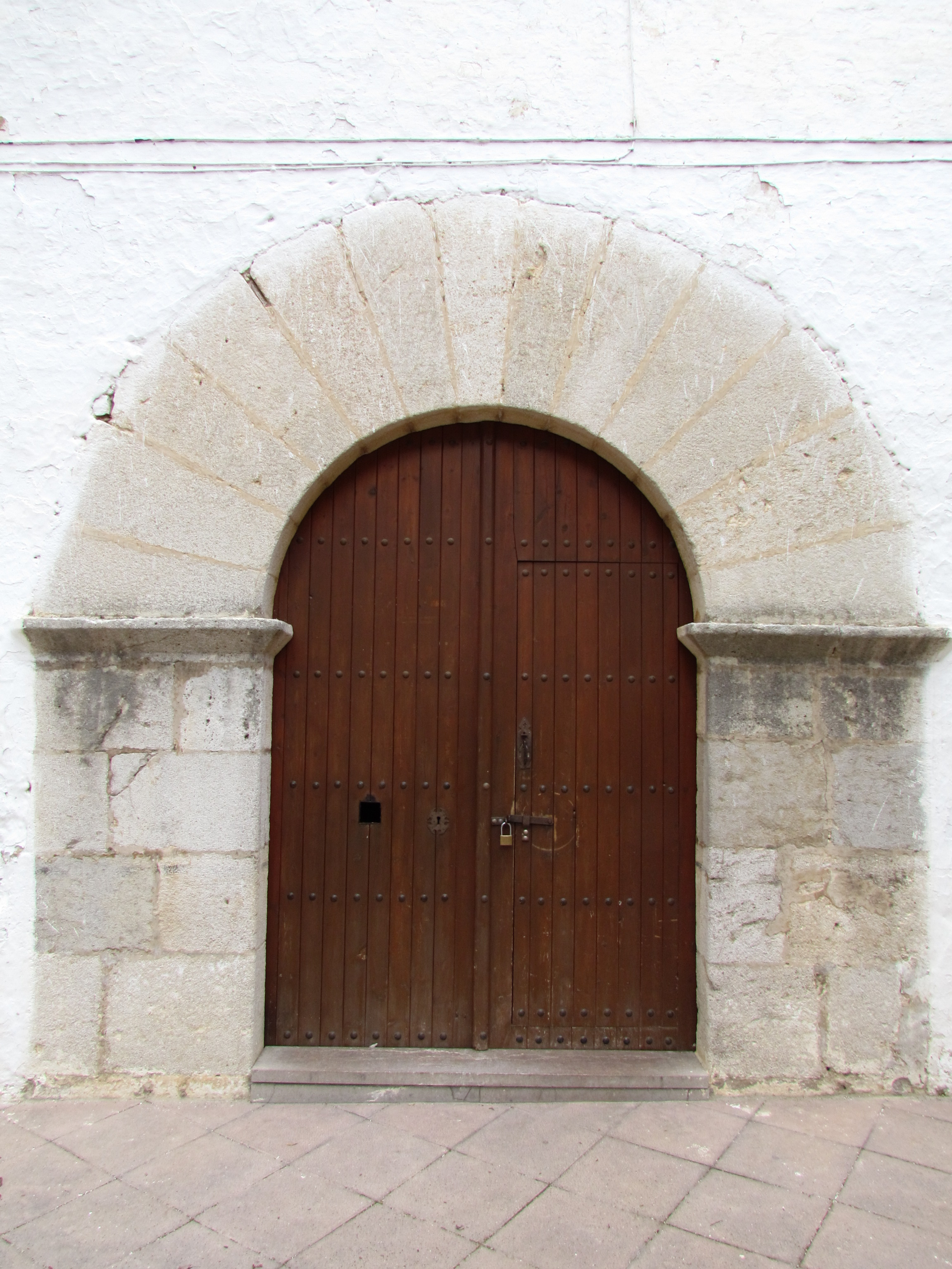 Portada de l'ermita de la Mare de Déu de l'Avellà de Catí, Alt MaestratUnknown portada de la ermita de la virgen del avellá de catí (castellón, españa)